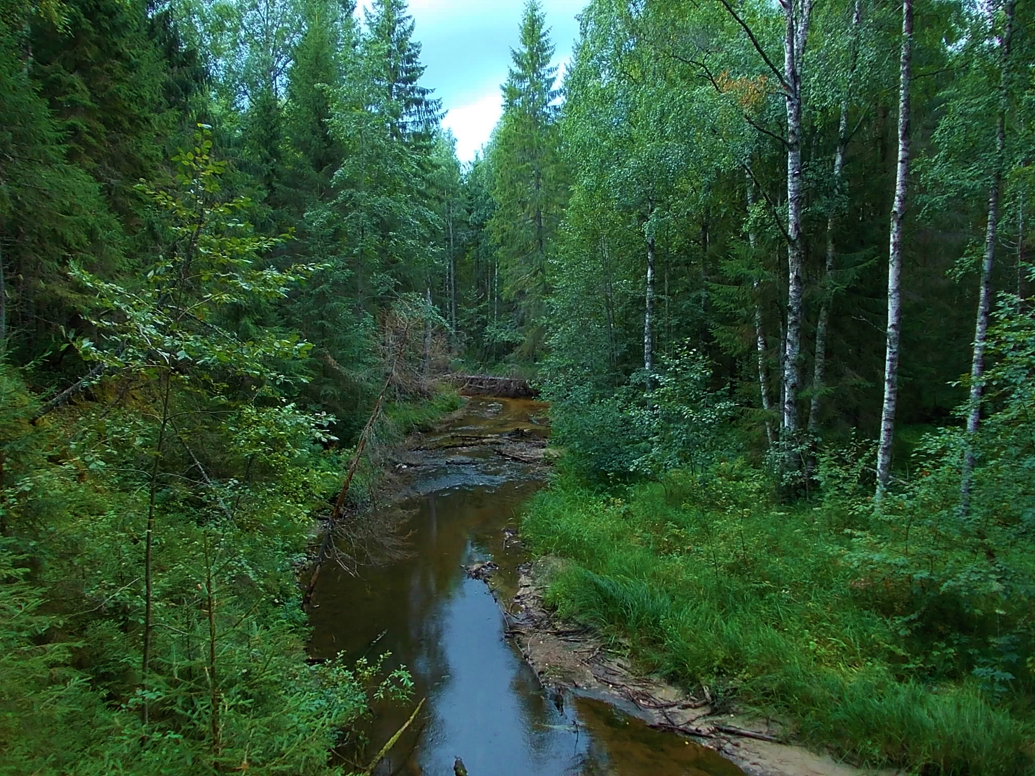 Река Кузьма